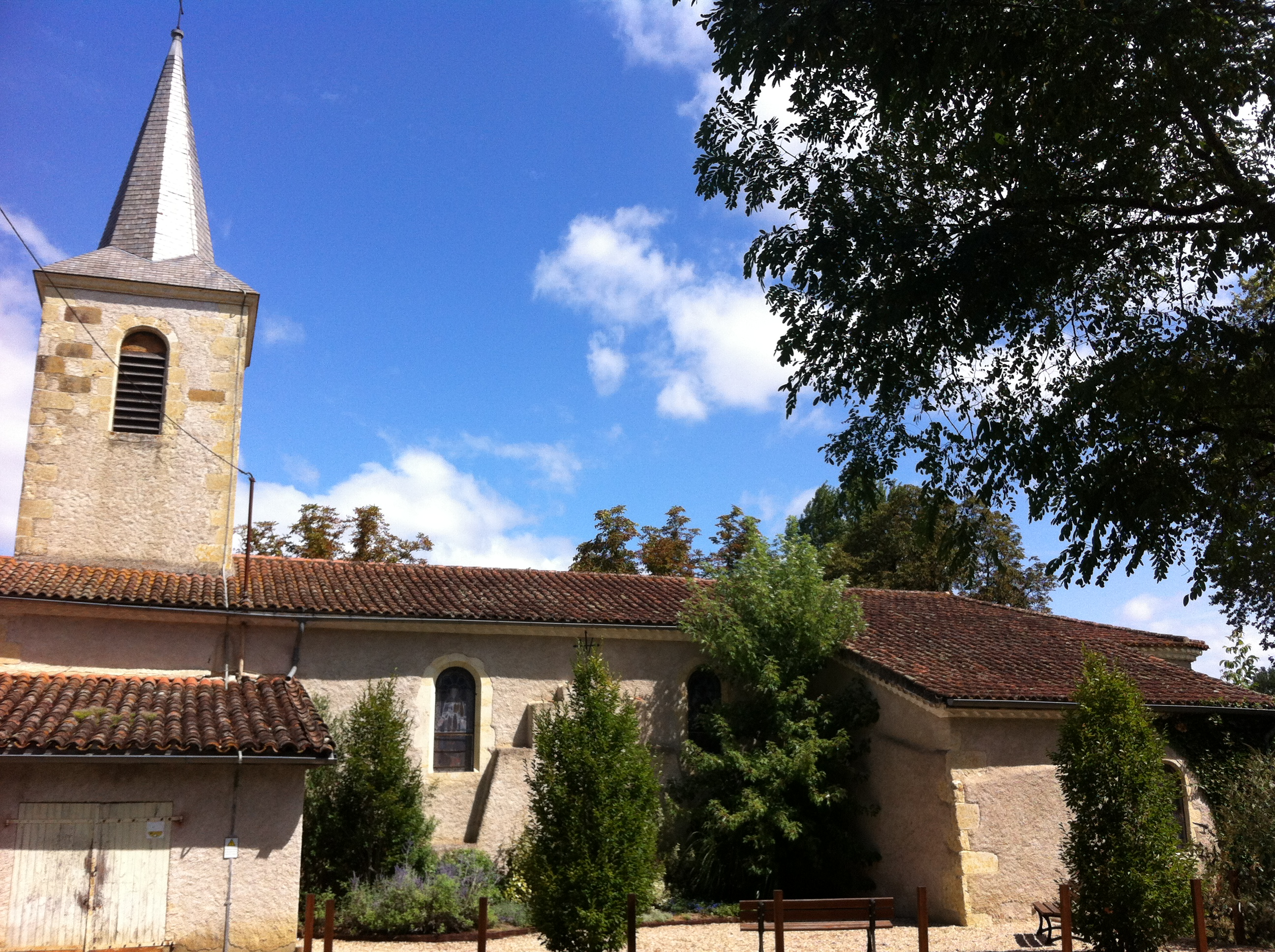 Eglise de Auterrive près d'Auch (Gers, France)